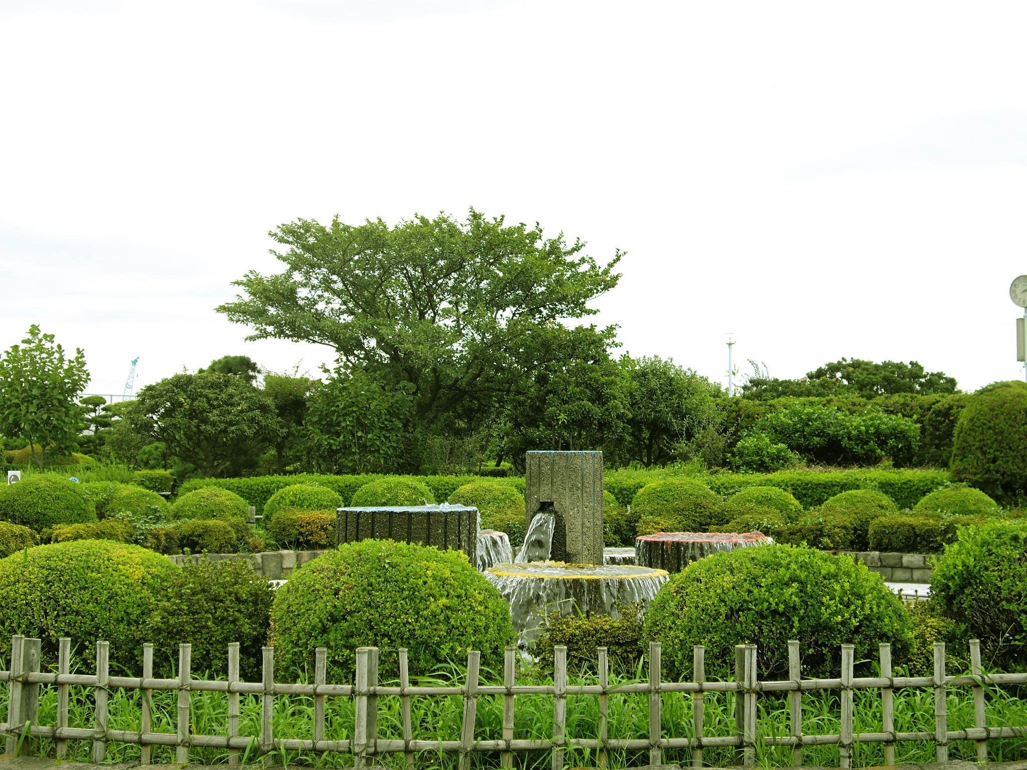 大田区立森ヶ崎公園